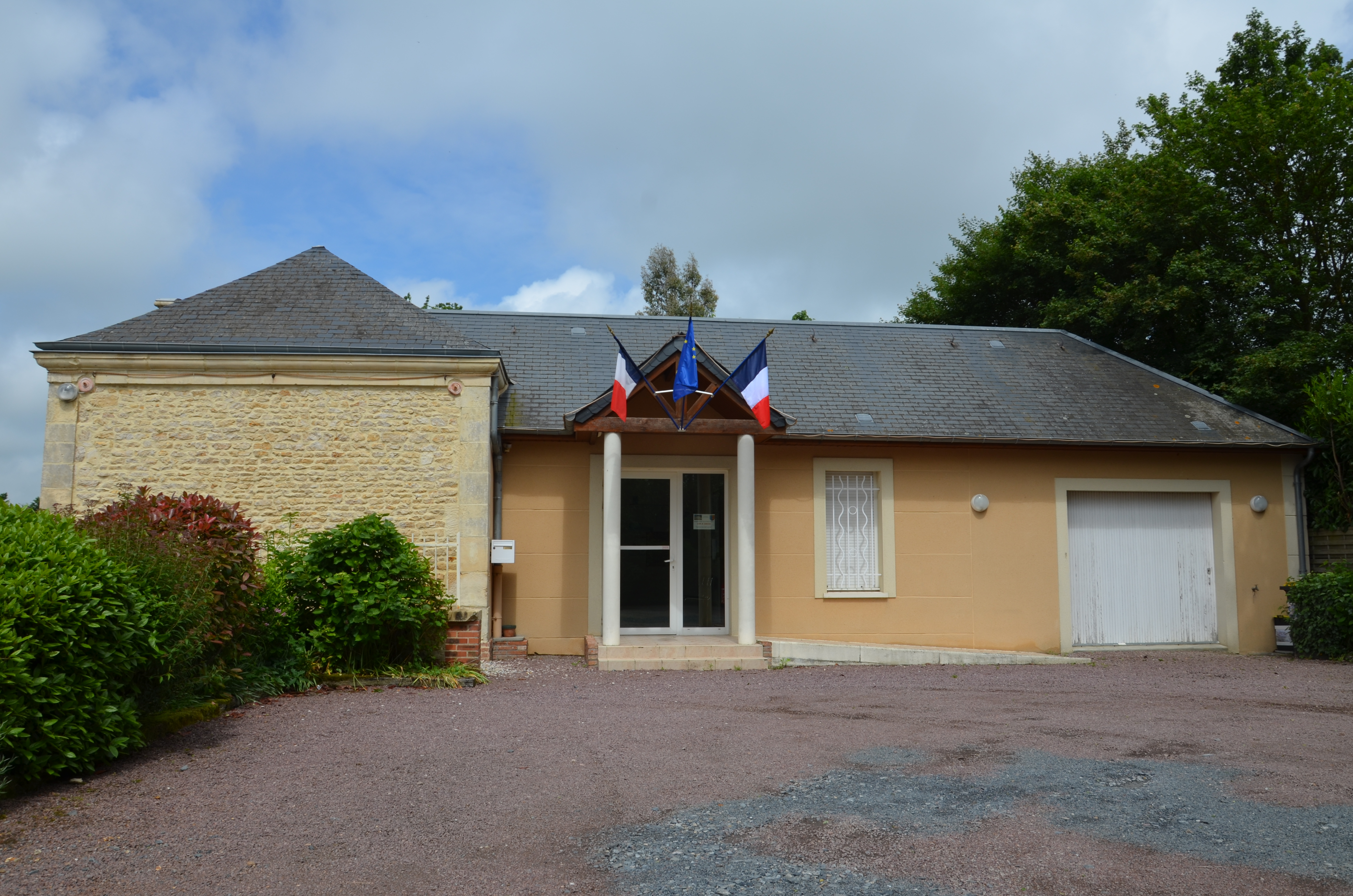 Hôtel de ville de Saint-Pair.